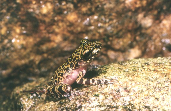 Spinomantis brunae